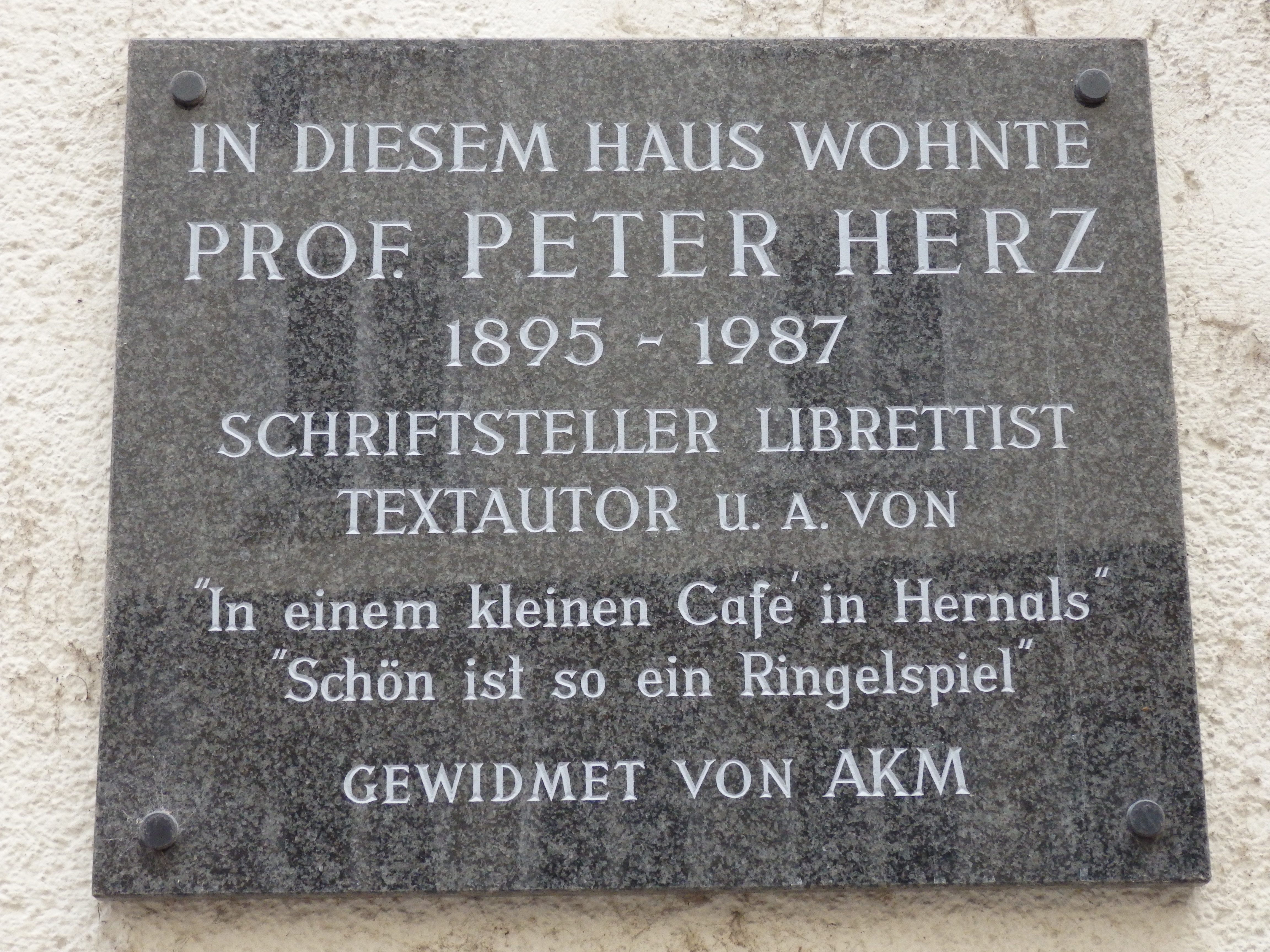 Gedenktafel Peter Herz, Fischerstiege 1-7, Wien-Innere Stadt